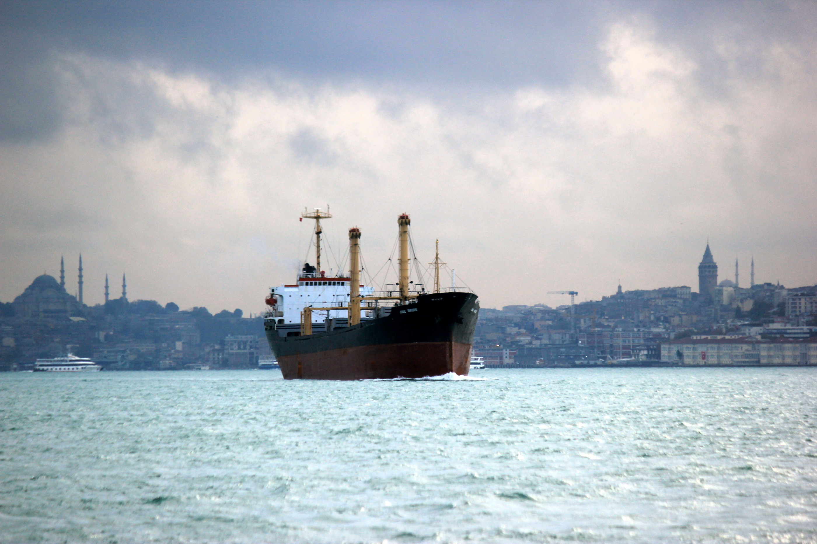 Das Stückgutschiff Ismael Mehieddine passiert den Bosporus in Istanbul. Das Schiff mit der IMO-Nummer 7616171 wurde 1976 als Baunummer 550 auf der Werft Ujina Zosensho in Hiroshima gebaut. Die Kiellegung geschah am 26. April 1976, der Stapellauf folgte am 11. Juli 1976 und am 25. August 1976 wurde das Schiff als Hand Fortune an die Auftraggeber abgeliefert. Umbenennungen: 1983 Kritonas, 1989 Palagruza, 1993 Isis I und 2003 Ismael Mehieddine. Am 27. April 2015 traf das Schiff in Gadani Beach ein, wo es ab 1. Mai 2015 verschrottet wurde. Daten: 6597 BRT, später 6883 BRZ, 11897 dwt, LüA 129,70 m, LzL 120,00 m, Breite 19,60 m.